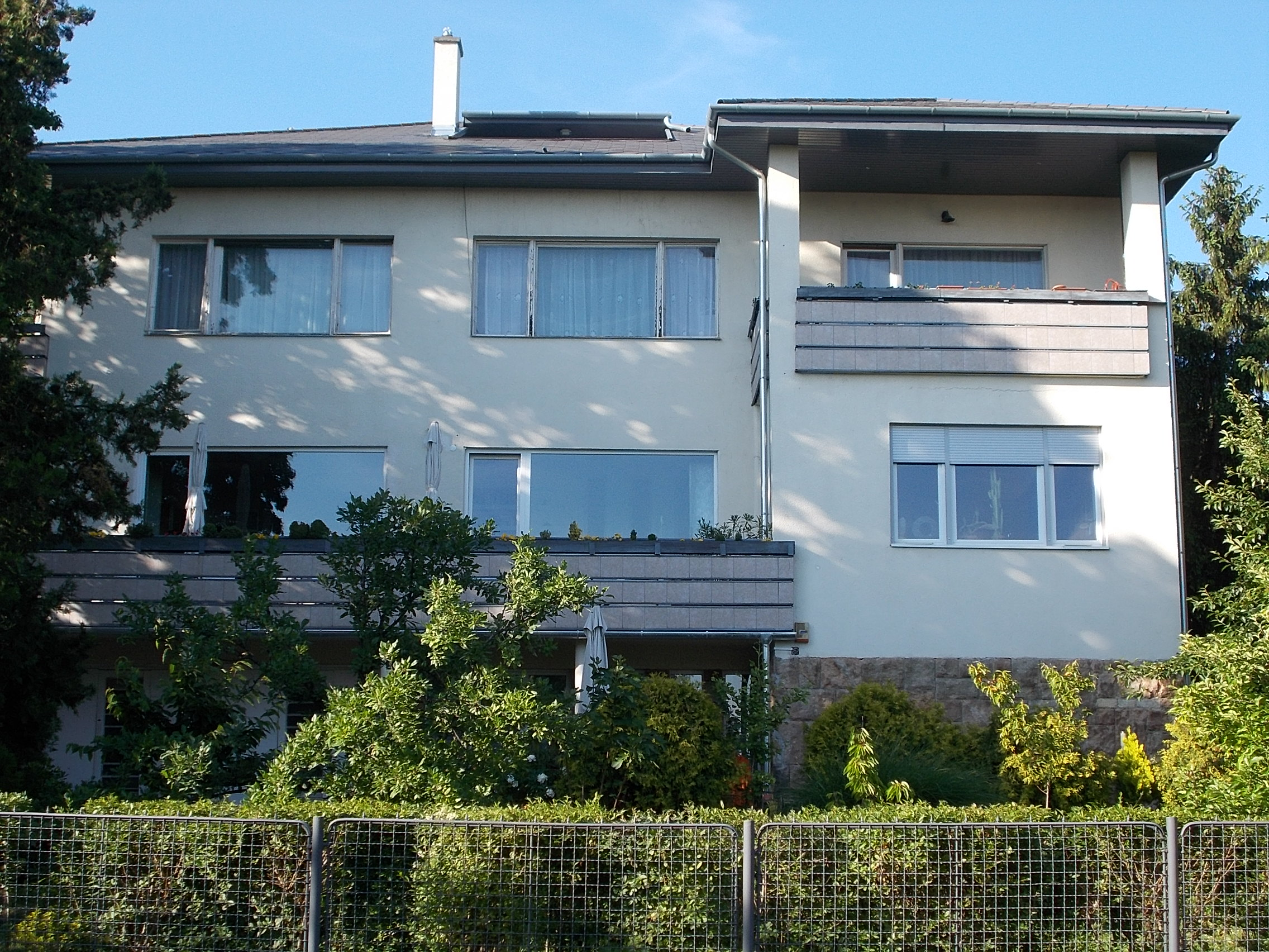 Bauhaus lakóépület. DK-i rész. Műemlék ID 8222. Budapest, XI. kerület, Ménesi út 75.